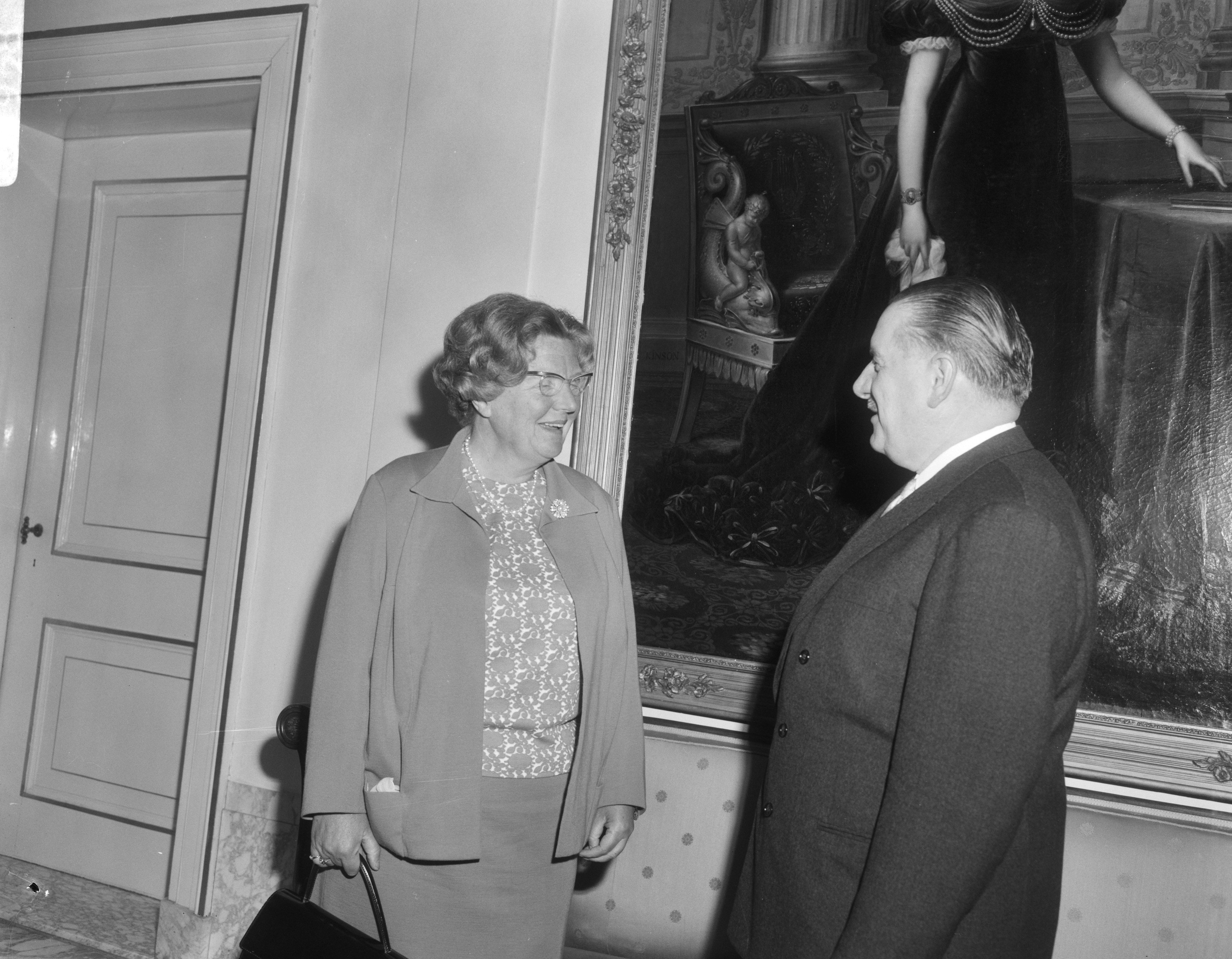 Collectie / Archief : Fotocollectie Anefo Reportage / Serie : [ onbekend ] Beschrijving : koningin Juliana ontvangt op Paleis Soestdijk nieuwe voorzitter Eurpese Parlement , Alain Poher Datum : 25 mei 1966 Trefwoorden : koninginnen, voorzitters Persoonsnaam : Alain Poher, Juliana (koningin Nederland) Instellingsnaam : Paleis Soestdijk Fotograaf : Bilsen, Joop van / Anefo Auteursrechthebbende : Nationaal Archief Materiaalsoort : Negatief (zwart/wit) Nummer archiefinventaris : bekijk toegang 2.24.01.04 Bestanddeelnummer : 919-1938